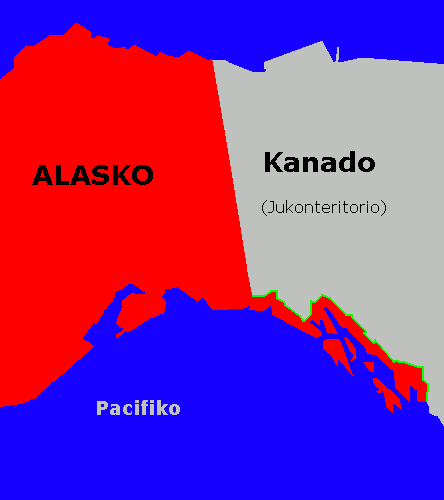 "Patotenilo" de Alasko